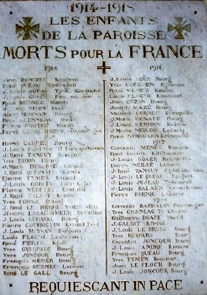 Panneau commémoratif des morts pour la France pendant la Première Guerre mondiale situé dans l'église paroissiale Saint-Fiacre de Guengat.